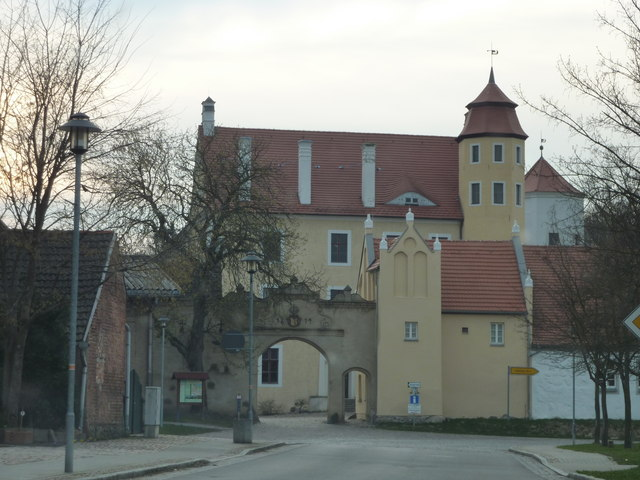 Schloss in Penkun (Landkreis Uecker-Randow)., 24 km from Prenzlau, Deutschland (Zone 33).